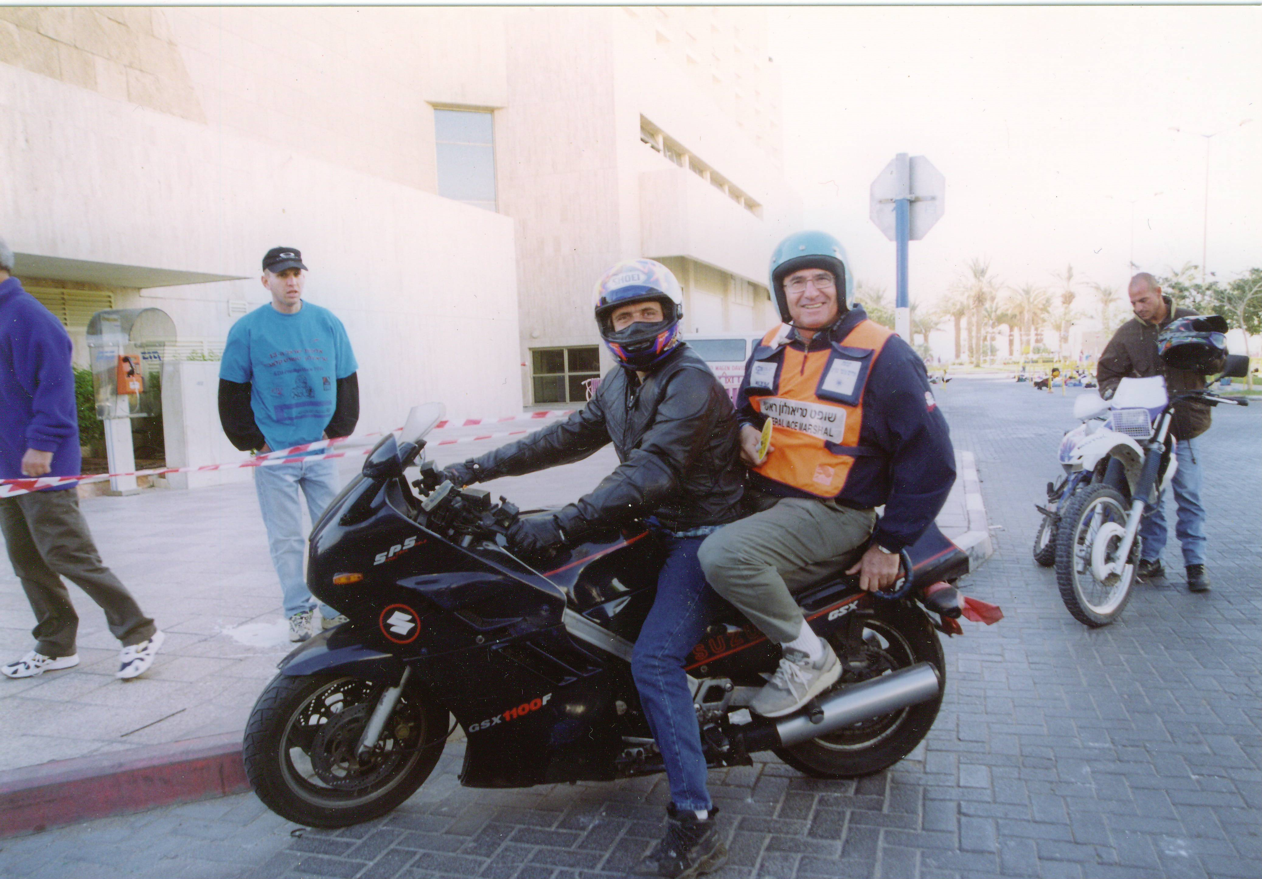 יוסף פיקל וחבר על אופנוע, טריאתלון אילת, 1999